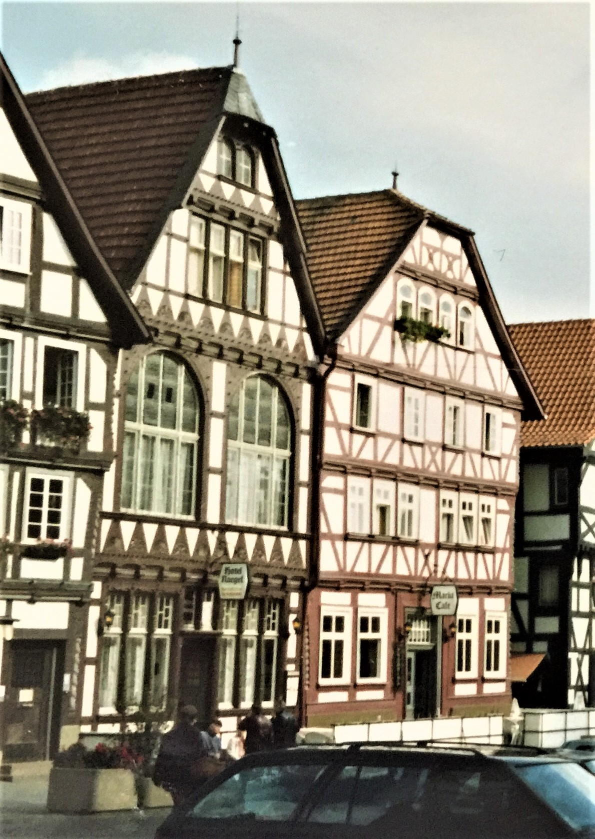 Die beiden Gebäude des damaligen Hotels Naegel am Marktplatz in Fritzlar, 1988